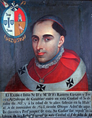 Ramón Casaus y Torres (1765-1845), arzobispo de Guatemala.